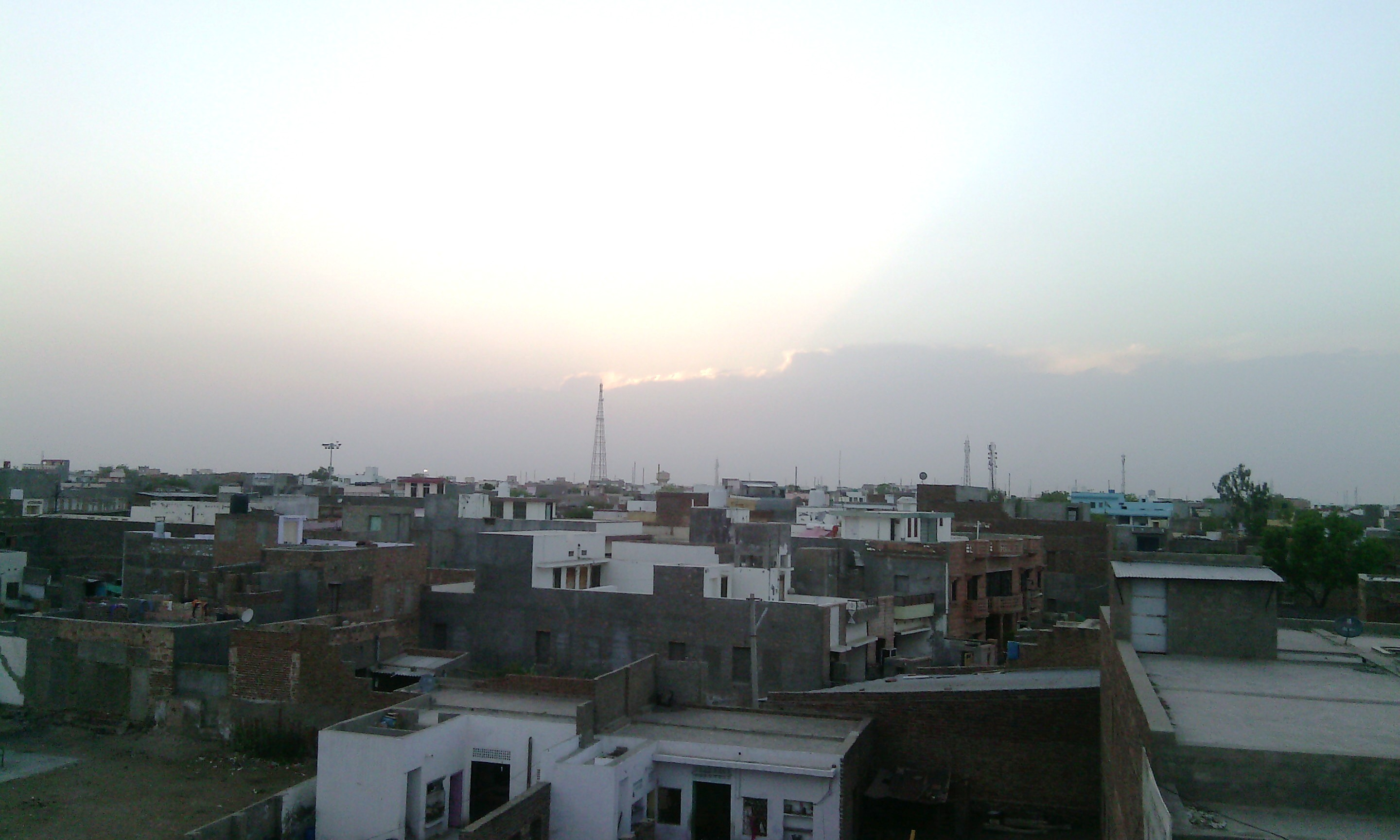 बालोतरा आद्योगिक क्षैत्र की दिशा में शहर की तस्‍वीर